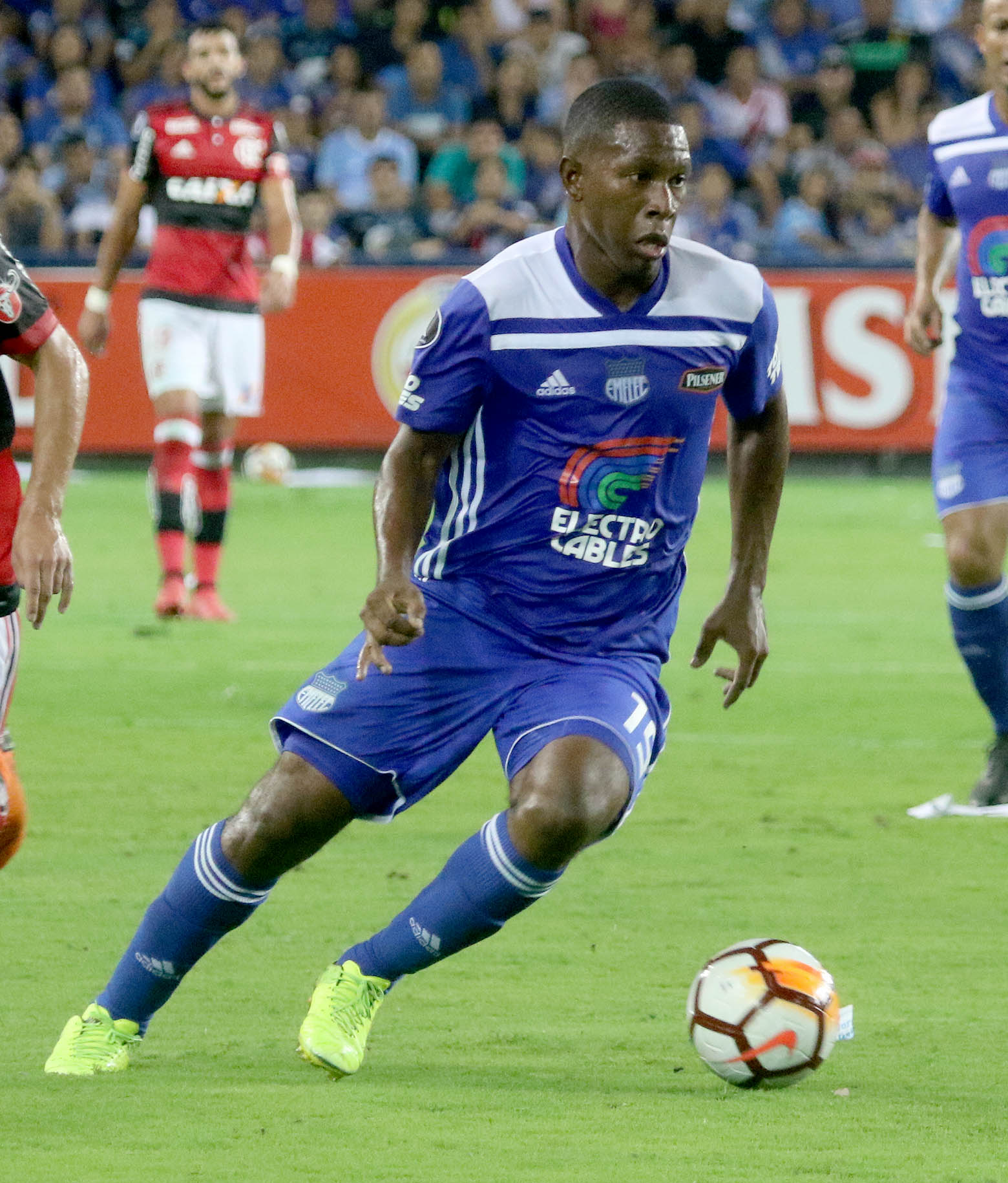 Guayaquil, miércoles 14 de marzo del 2018 (Andes).-En el estadio Capwell, Emelec enfrenta a Flamengo de Brasil, en partido por la segunda fecha del grupo D de la Copa Libertadores. Foto:César Muñoz/Andes